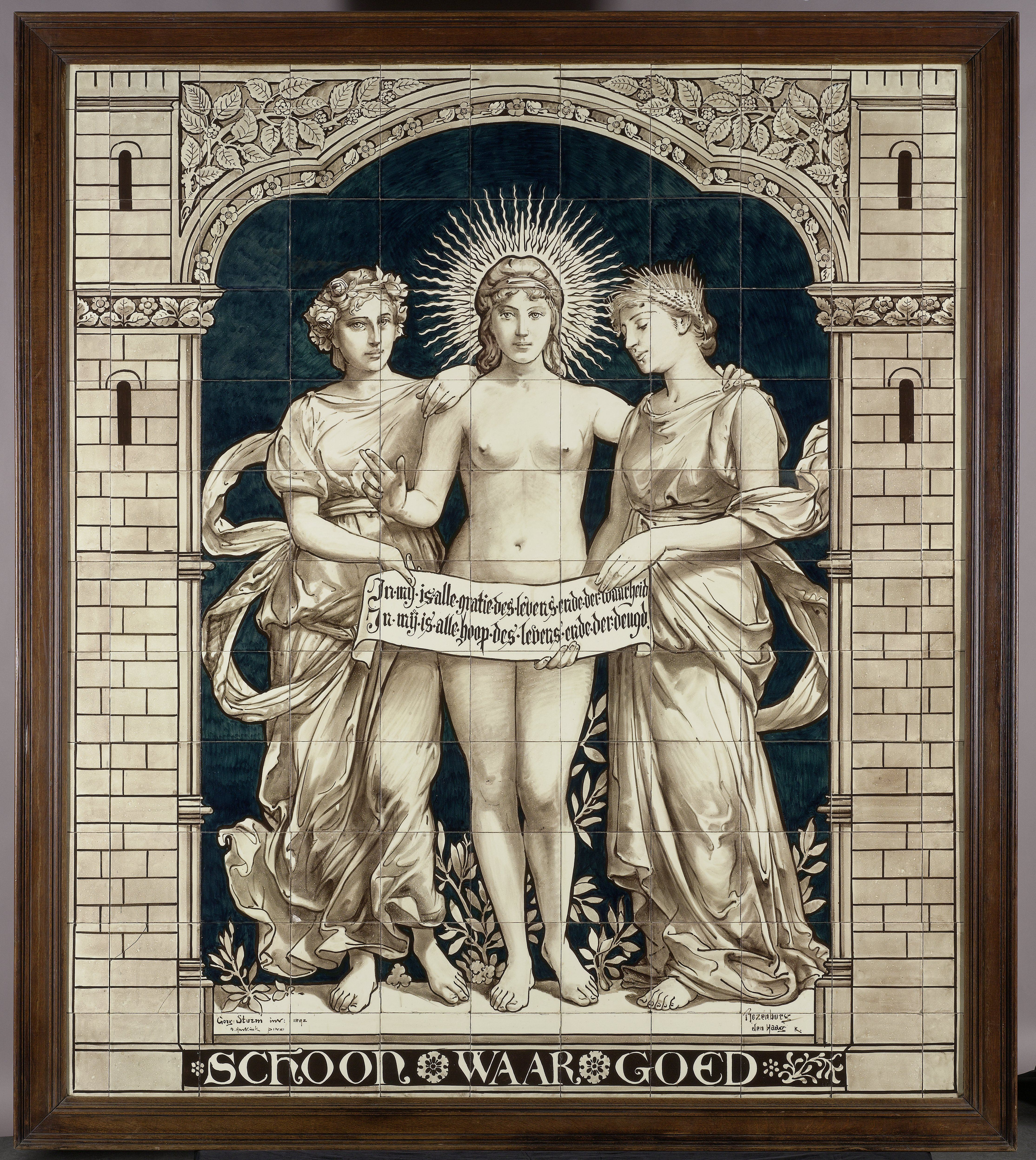 Tegeltableau met de drie gratiën: onder een poort die gedekt wordt met een driepasmotief zien we ter weerszijden van de naakte Waarheid met haar klassieke haartooi en de zon der gerechtigheid als nimbus achter haar hoofd, de jonge vrouw Schoon met een bloemenkroon op haar hoofd en de wat rijpere vrouw Goed met korenhalmen gevlochten in haar haar. Terwijl Waar haar arm om Goed slaat, wordt deze betrokken bij Schoon via de banderol met het opschrift IN MIJ IS ALLE GRATIE DES LEVENS ENDE WAARHEID. IN MIJ IS ALLE HOOP DES LEVENS ENDE DER DEUGD. Gesigneerd: r.o. Rozenburg den Haag K (jrl.=1893); l.o. Georg:Sturm inv:1892/D Harkink pinx. Op de achterzijde van elke tegel in reliëf ROZENBURG/DEN HAAG. Beschildering onder loodglazuur in beige en bruin. ontwerper: Georg Sturm, schilder: Daniël Harkink